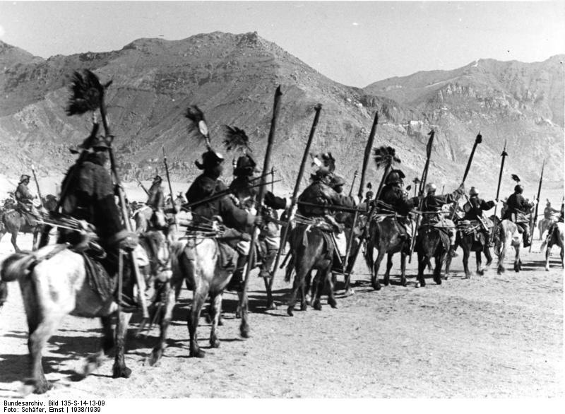 Lhasa, Neujahrsparade